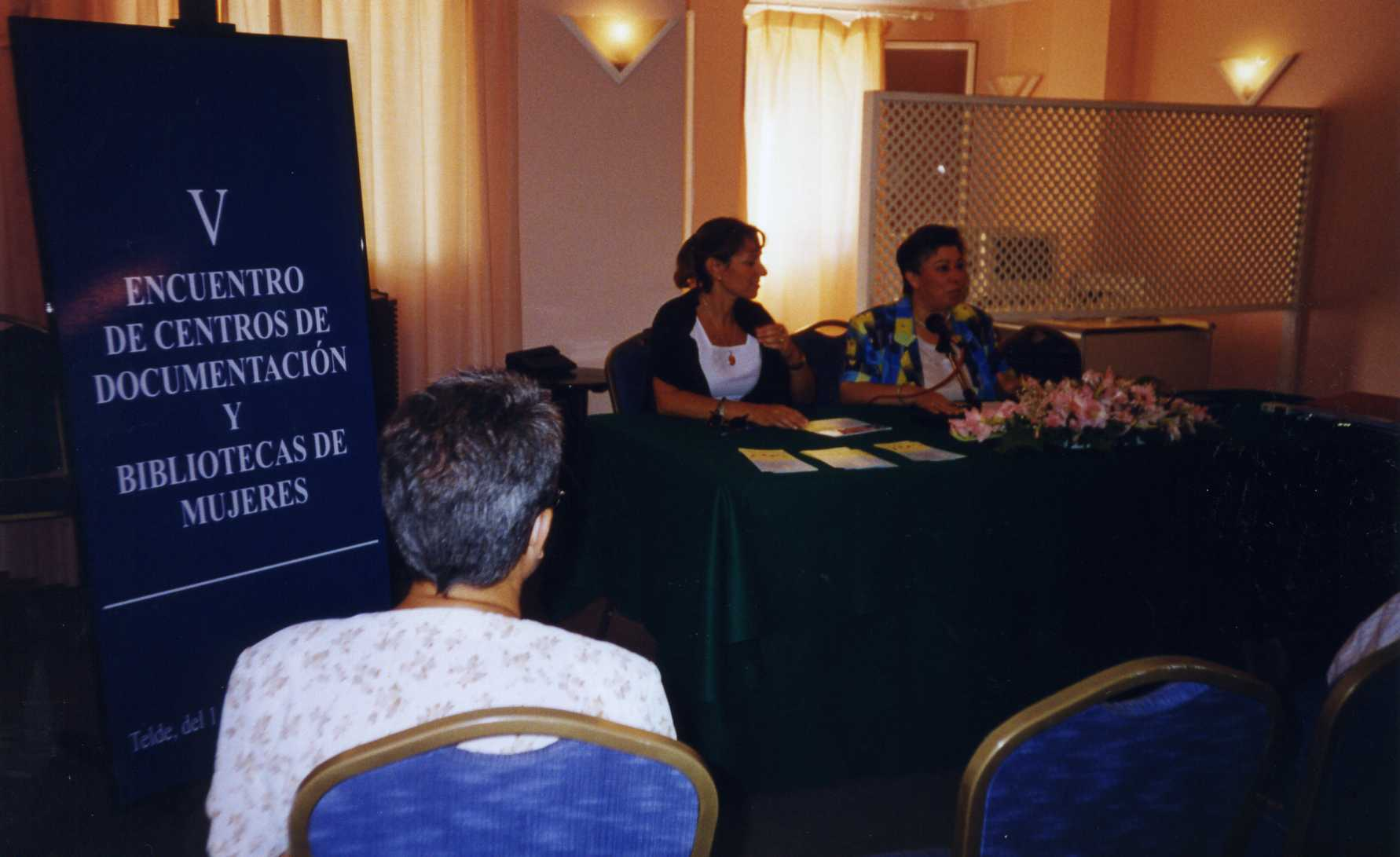 Rede de Centros Documentación e Bibliotecas de Mulleres (Telde, 1998)